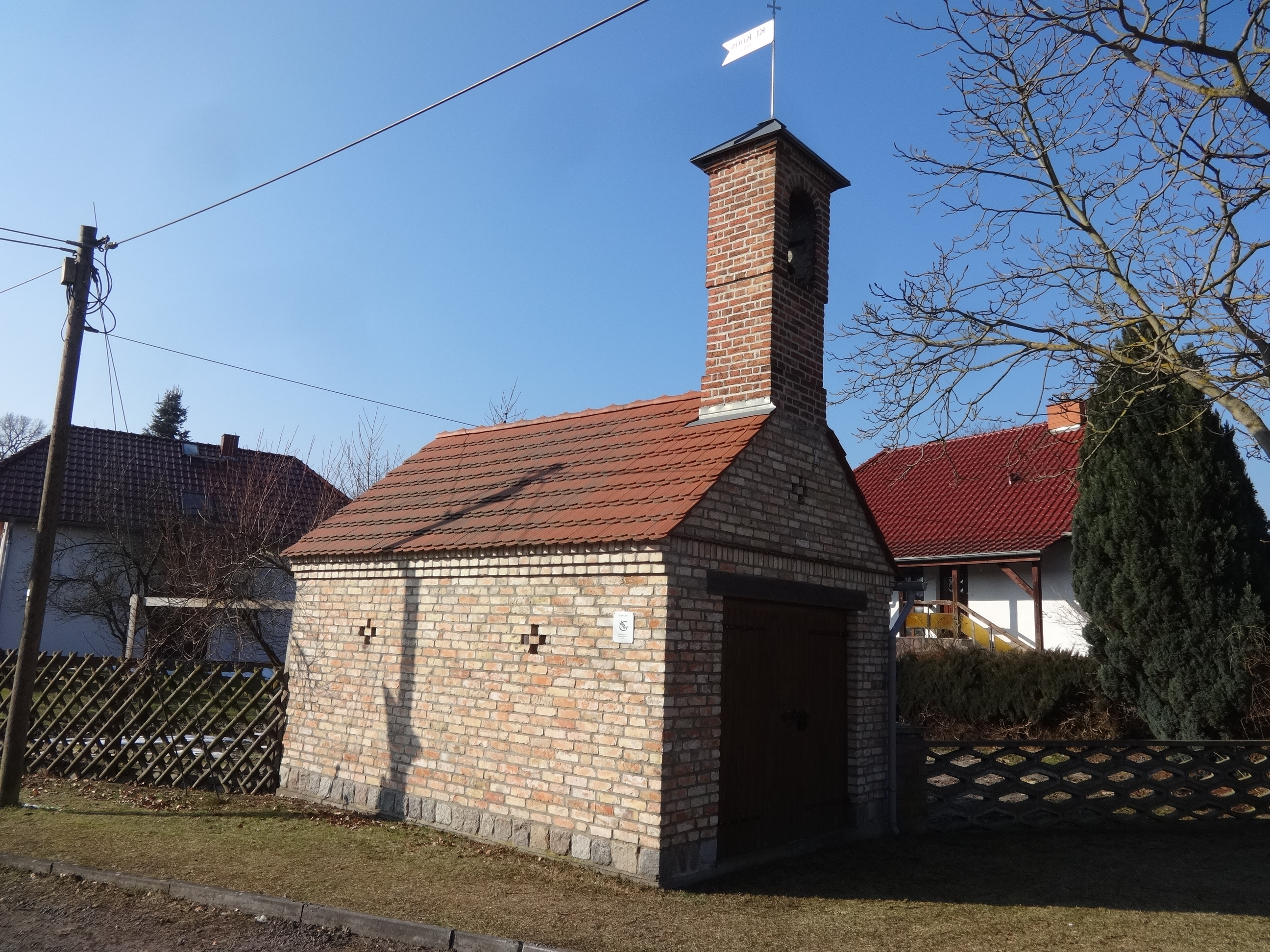 Klein Köris, ein Ortsteil der Gemeinde Groß Köris im Landkreis Dahme-Spreewald in Brandenburg